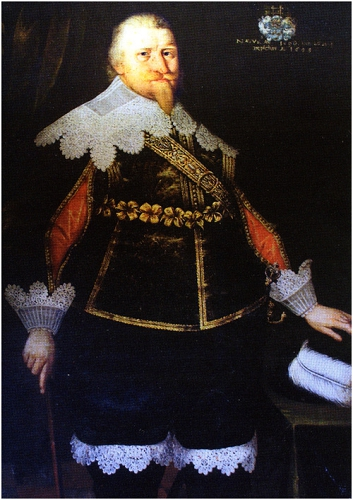 Caspar Otto Sperling 1596-1655, Hallands förste guvernör 1646, Sperlingsholms grundare